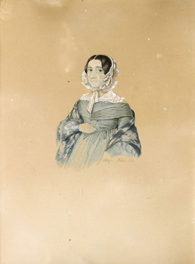 Női portré. Sikó Miklós (Seplér, 1818 - Marosvásárhely, 1900) festménye.